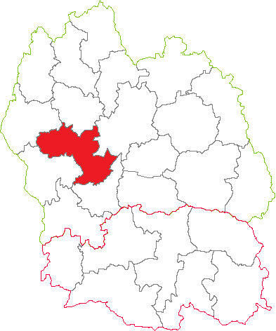 Situation du canton dans le département de la Lozère (France)